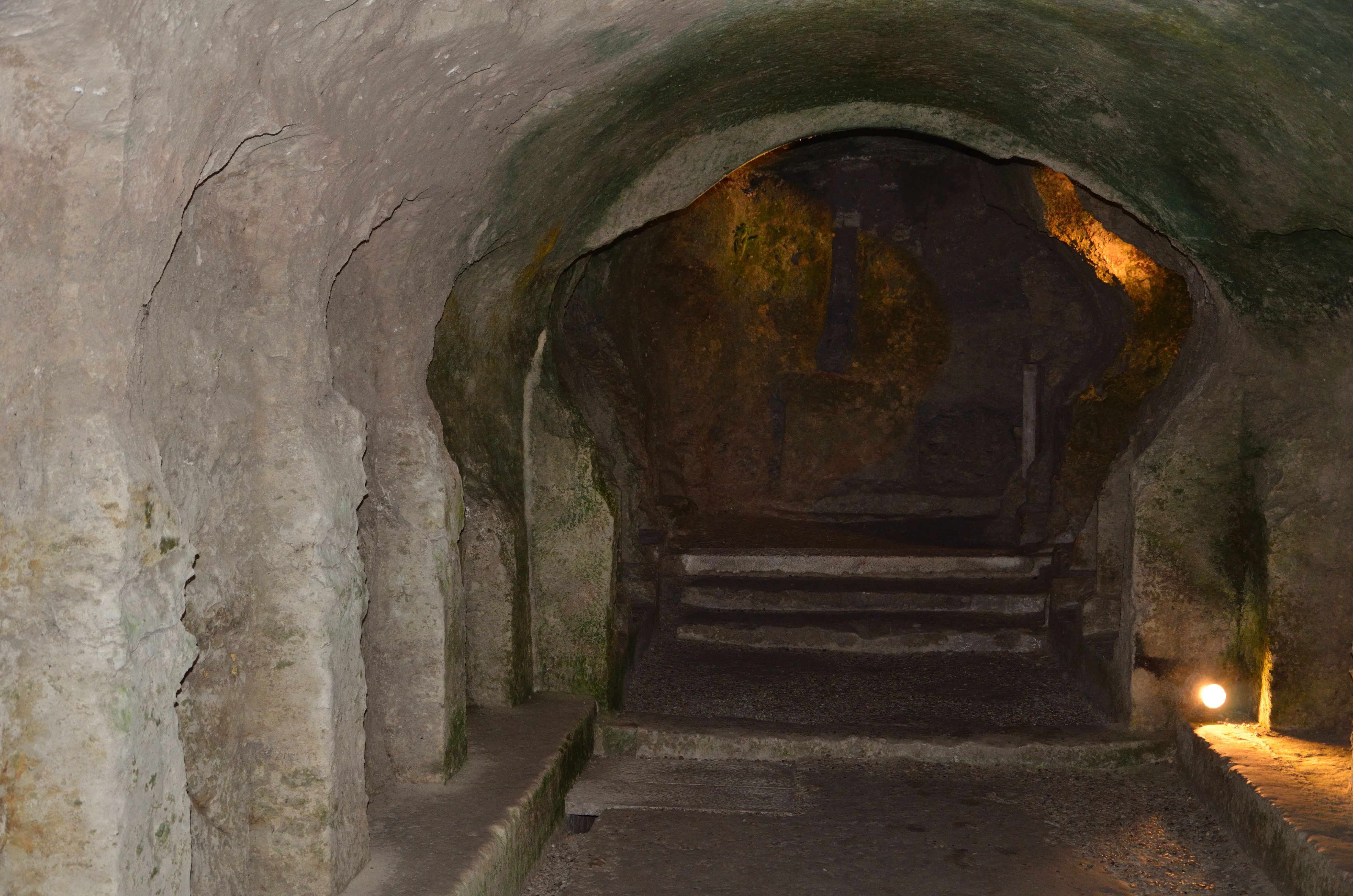 Crypte de l'église monolithe Saint-Jean d'Aubeterre